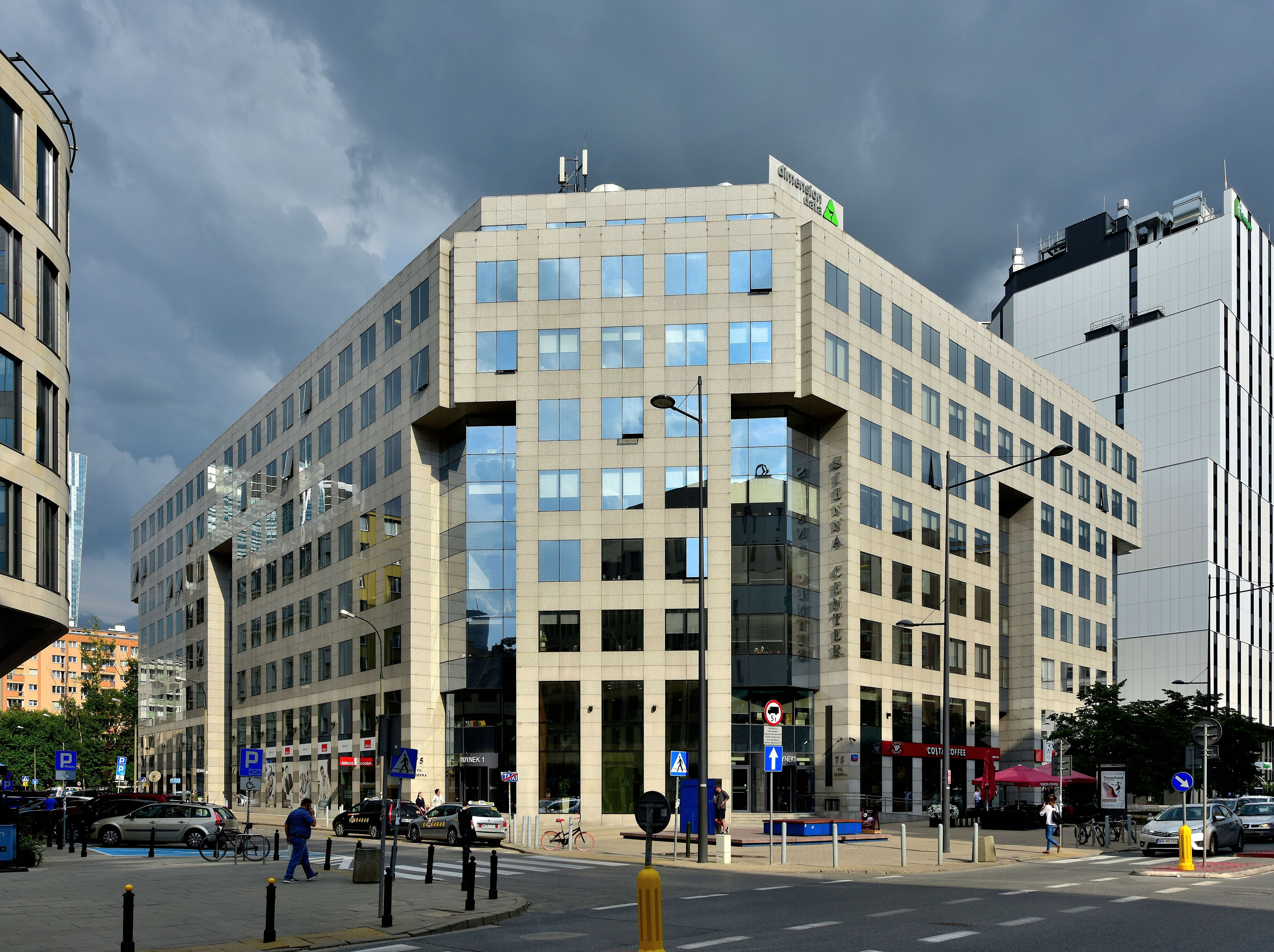 Biurowiec Sienna Center w Warszawie